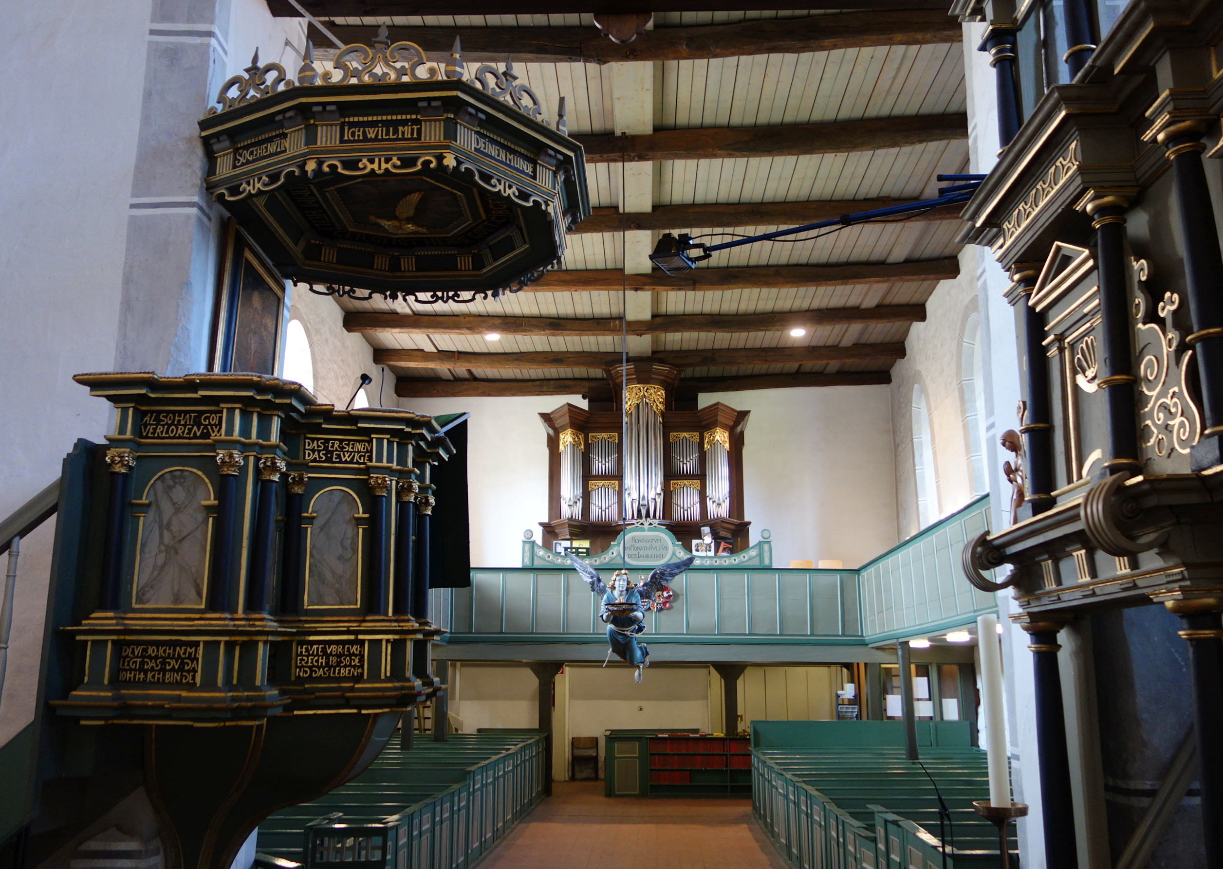 St. Marien Gudow, Kreis Herzogtum Lauenburg, Schleswig-Holstein, Deutschland